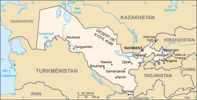 Map in French of Uzbekistan - Carte de l'Uzbekistan.